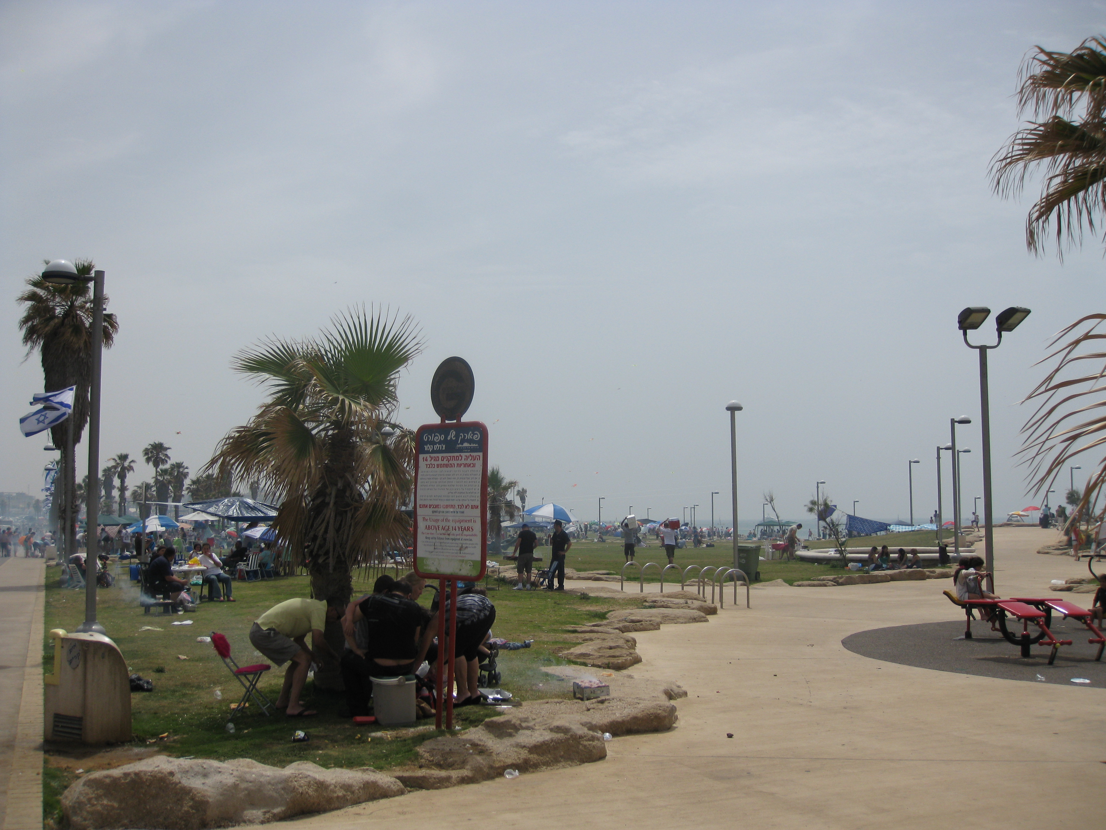 Israel 62nd Independence Day- Charles Clor park יום העצמאות השישים ושתים למדינת ישראל פארק צ'ארלס קלור